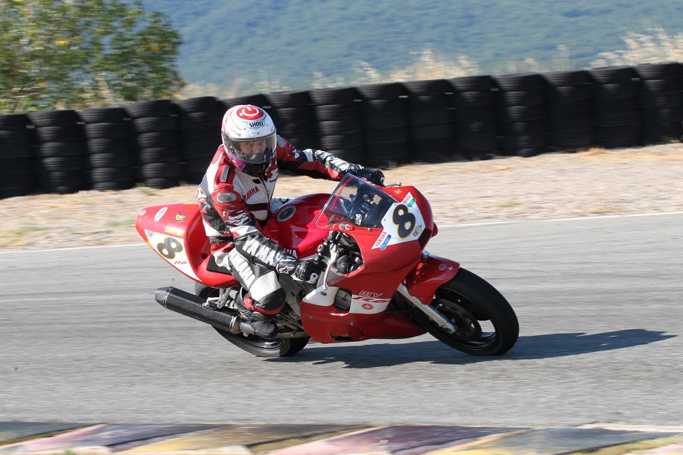 Yamaha R6, Circuit Le Luc, Var, août 2019.